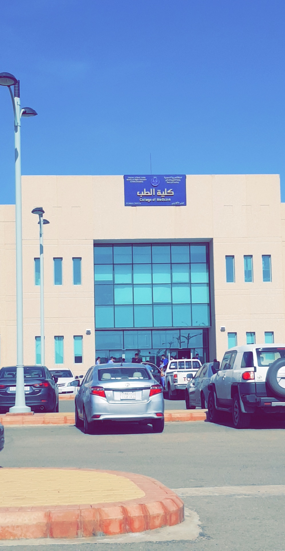 المبنى الأكاديمي لكلية الطب بجامعة الباحة